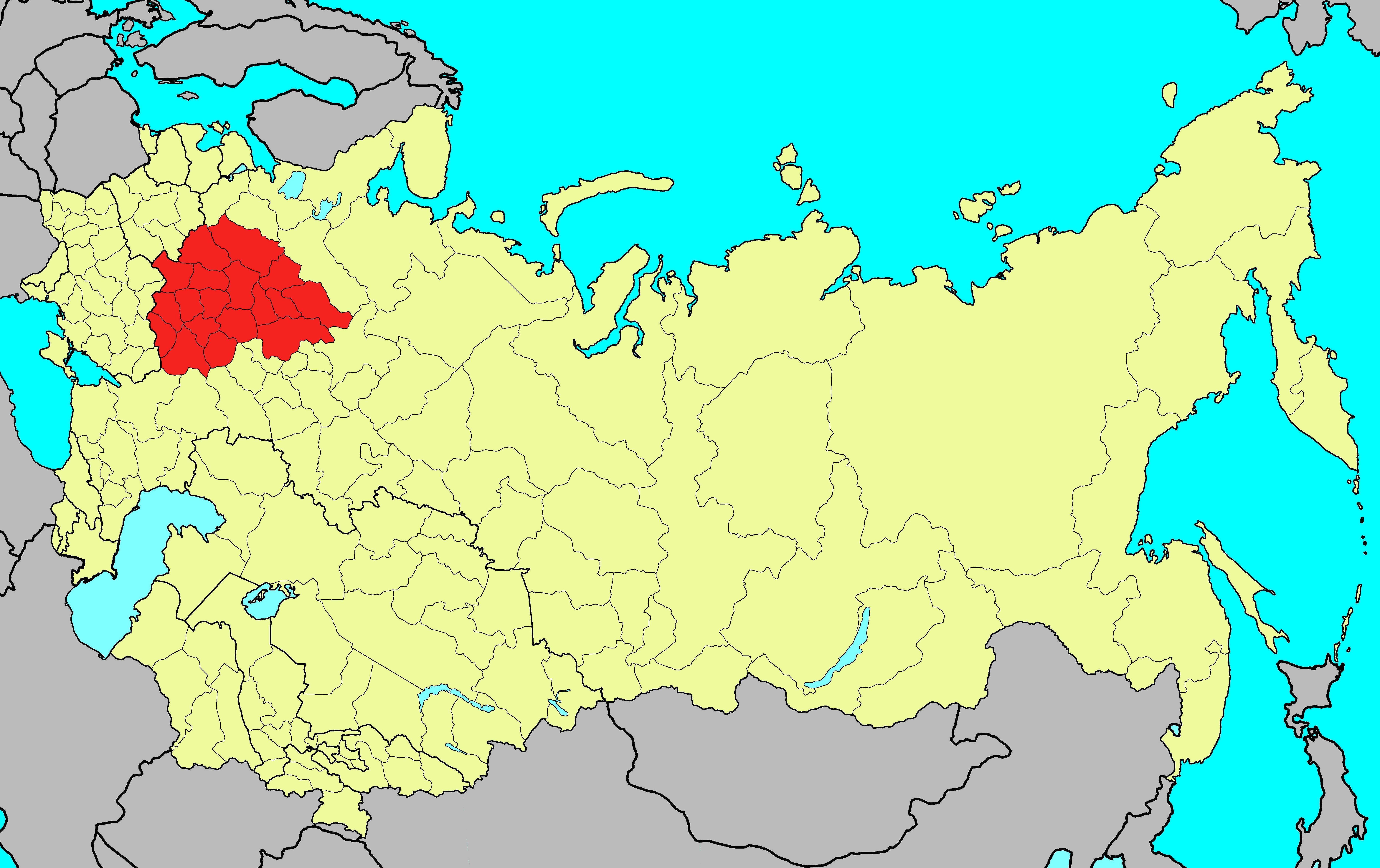 Московский военный округ ВС СССР на 1991 год